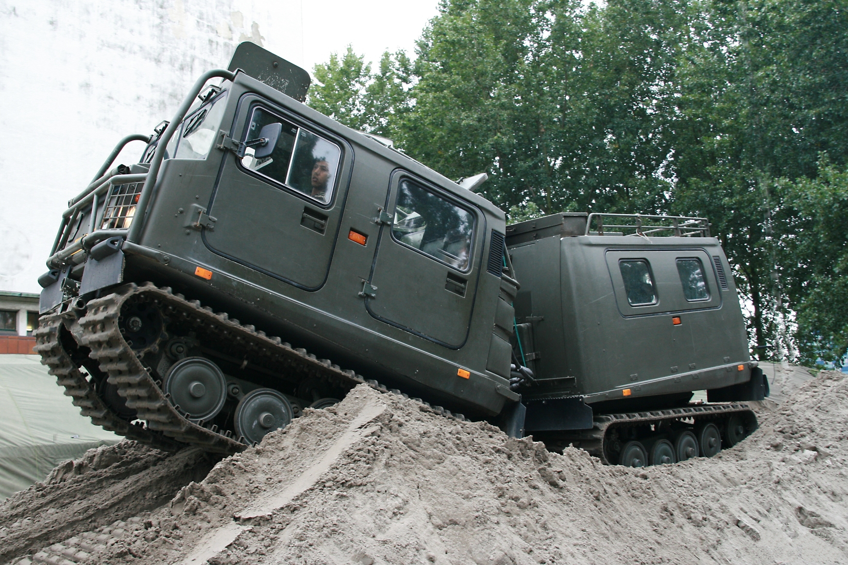 Zijaanzicht BV-206 van het Korps Mariniers tijdens de Wereldhavendagen 2007.